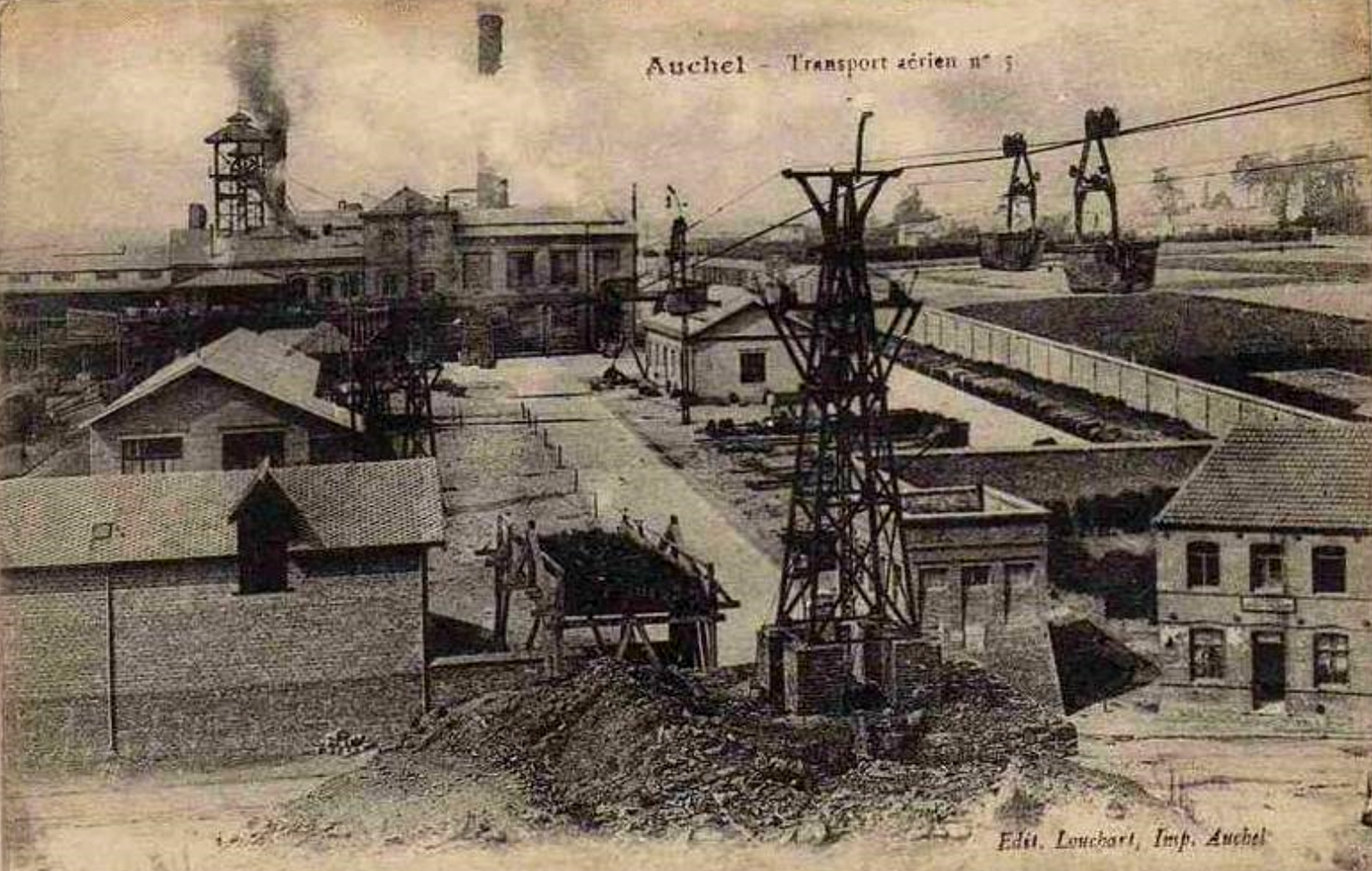 La Fosse n° 5 - 5 bis - 5 ter de la Compagnie des mines de Marles était un charbonnage constitué de trois puits situé à Auchel, Pas-de-Calais, Nord-Pas-de-Calais, France.